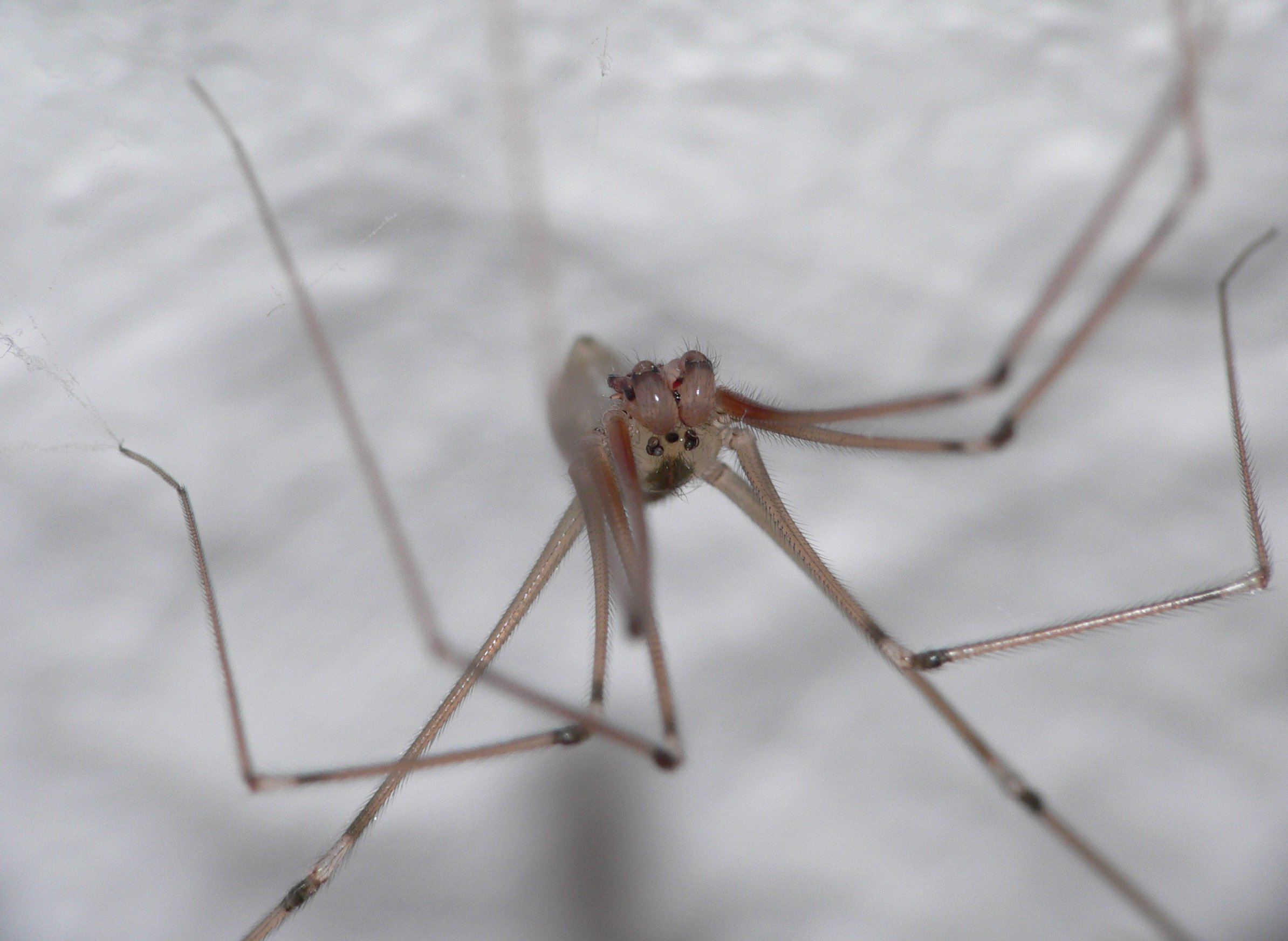 pholcus phalangioides (Fuesslin 1775)